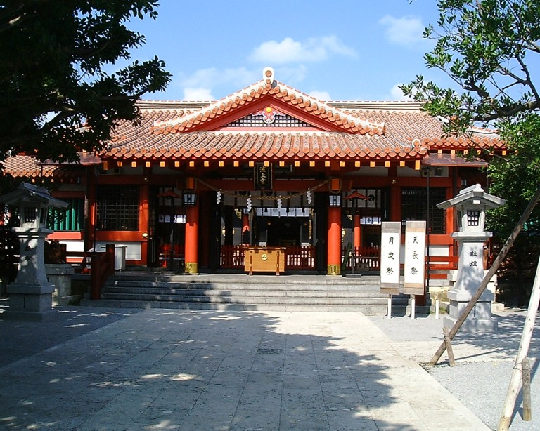 波上宮拝殿